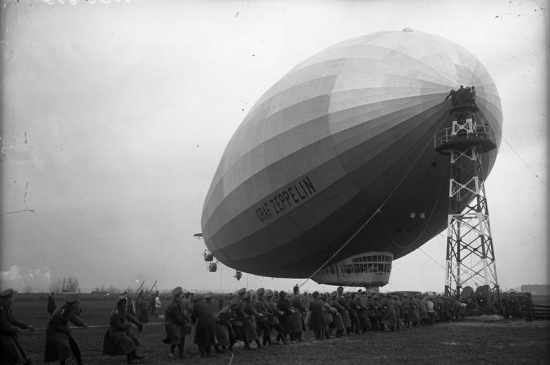 Luftschiff "Graf Zeppelin" am Ankermast in Staaken.